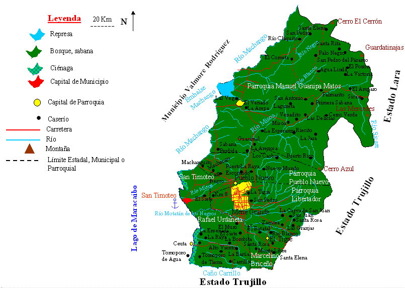 Mapa del Municipio Baralt, Estado Zulia, Venezuela